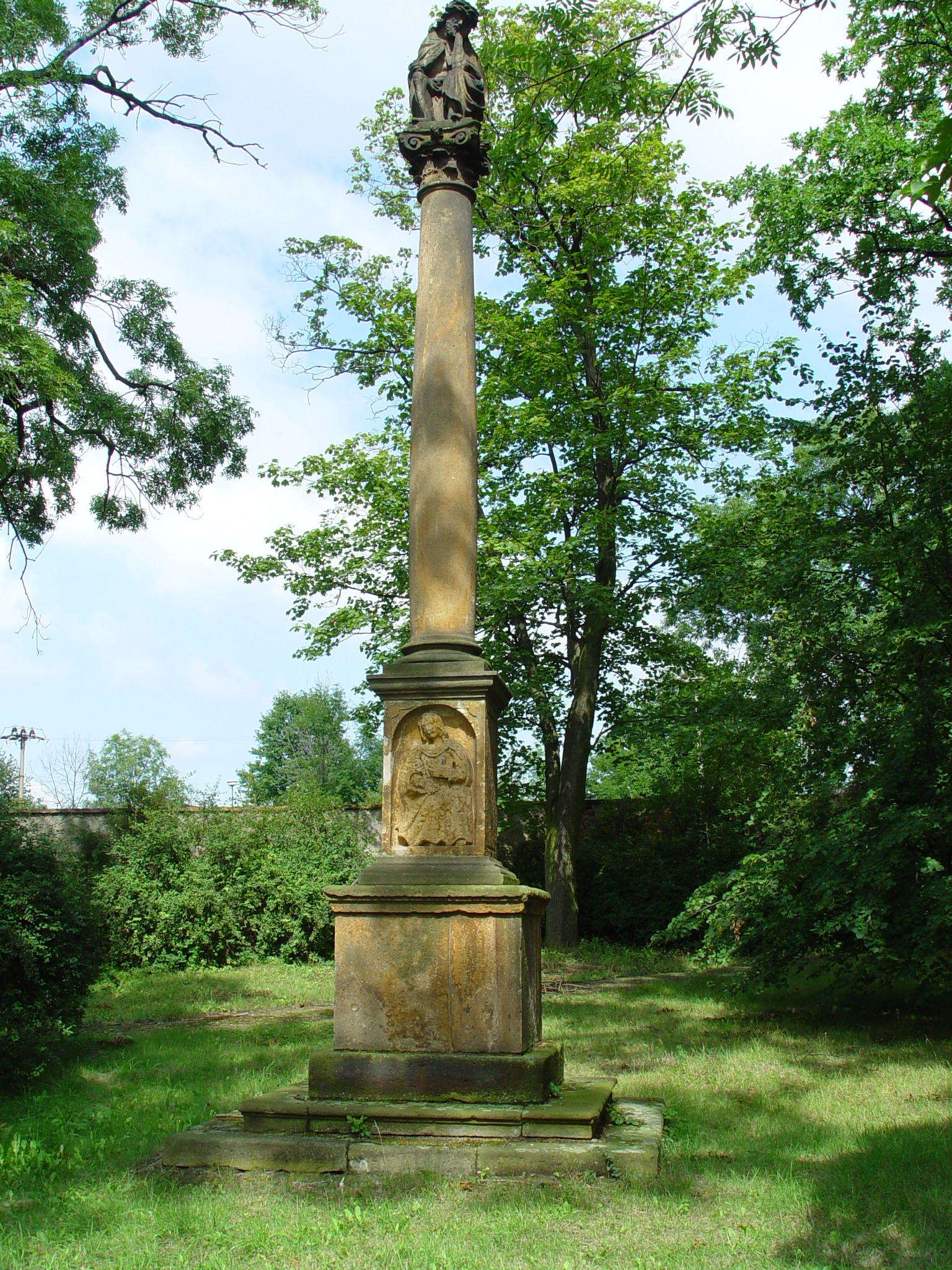 Sloup se sochou Ecce Homo (Chrámce), v zahradě u zámku čp. 14, Z od budovy, Chrámce